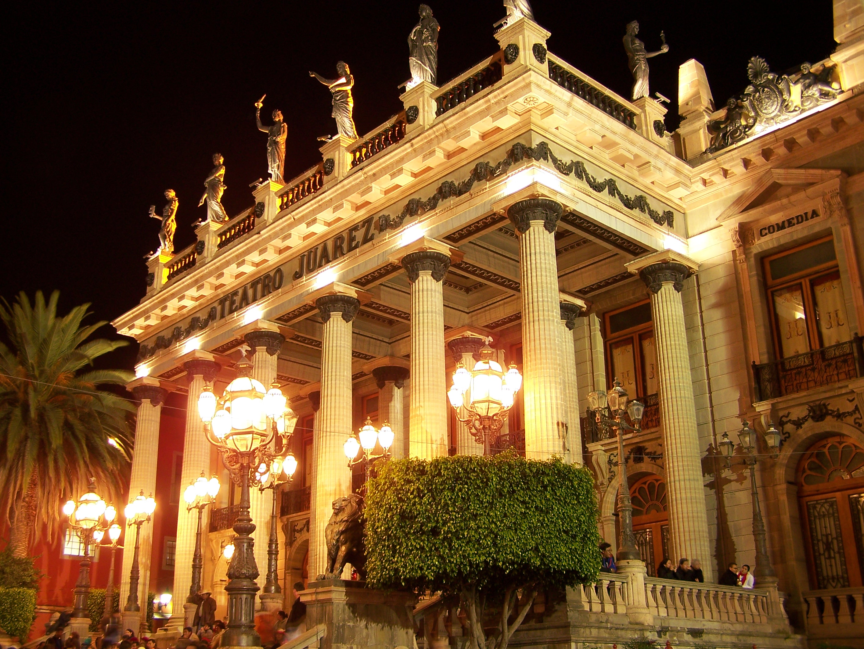 Teatro Juárez, en Guanajuato, México.